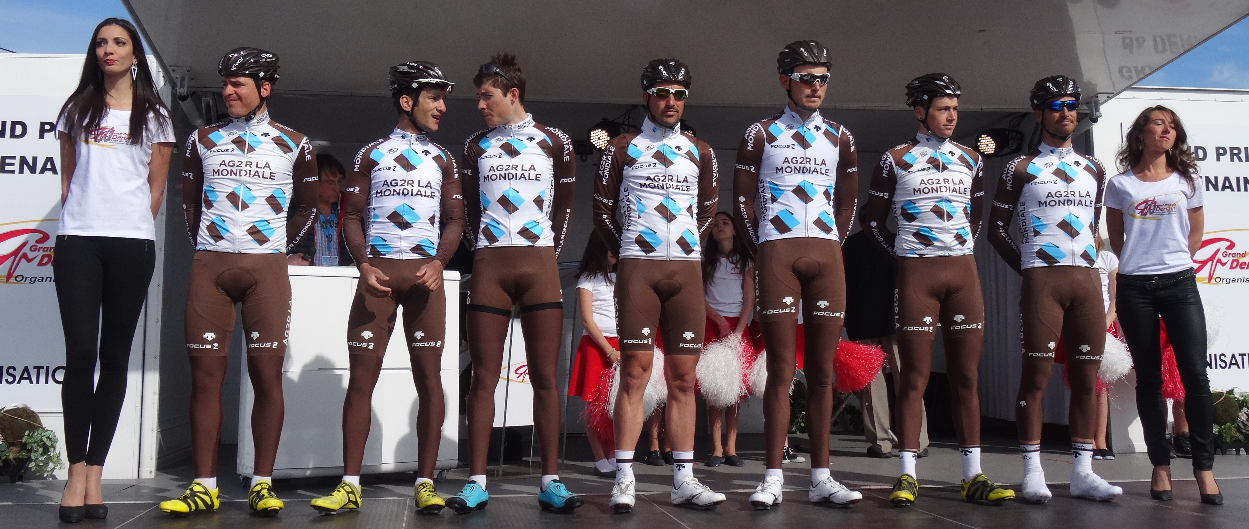 Reportage réalisé le jeudi 17 avril à l'occasion du départ et de l'arrivée du Grand Prix de Denain 2014 à Denain, Nord, Nord-Pas-de-Calais, France.